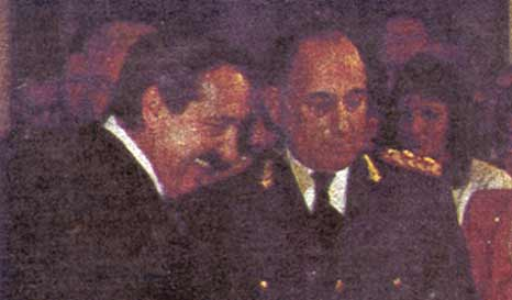 Raúl Ricardo Alfonsín y Héctor Luís Ríos Ereñú